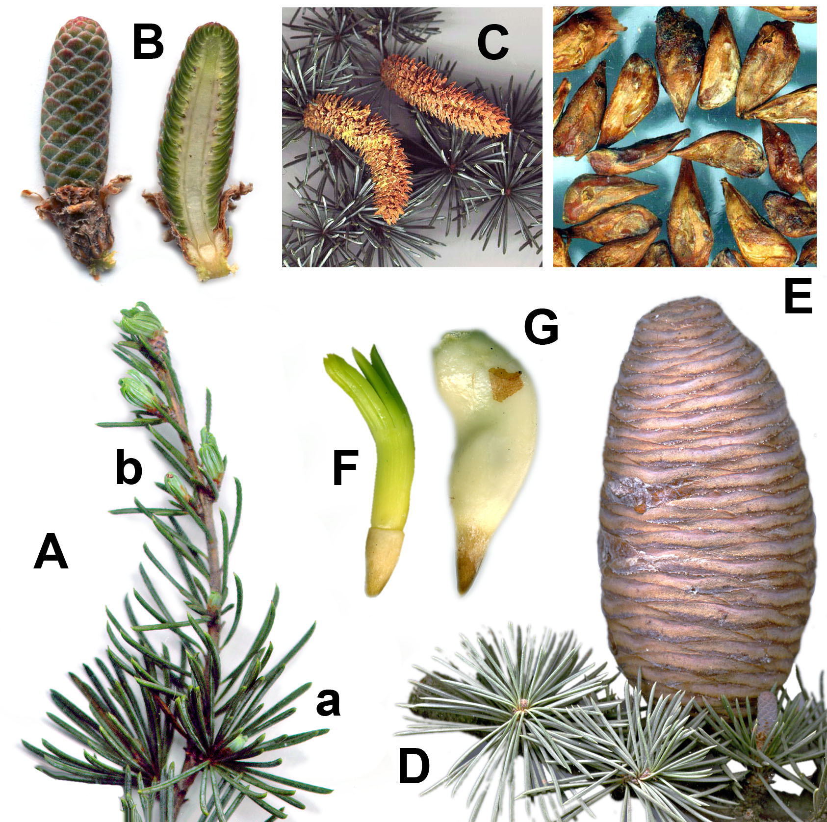 Cedrus atlantica А-гранчица, a-краткораст, b-дугораст, B-макростробила, C-микростробила, D-зрела шишарица, E-семе без крила, F-ембрион G-ендосперм (аутор: Михаило Грбић).